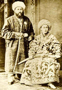 Сеид Мир Мансур, сын эмира Музаффара. Бухарский эмират.